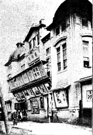 京城府の映画館、喜樂館、1922年